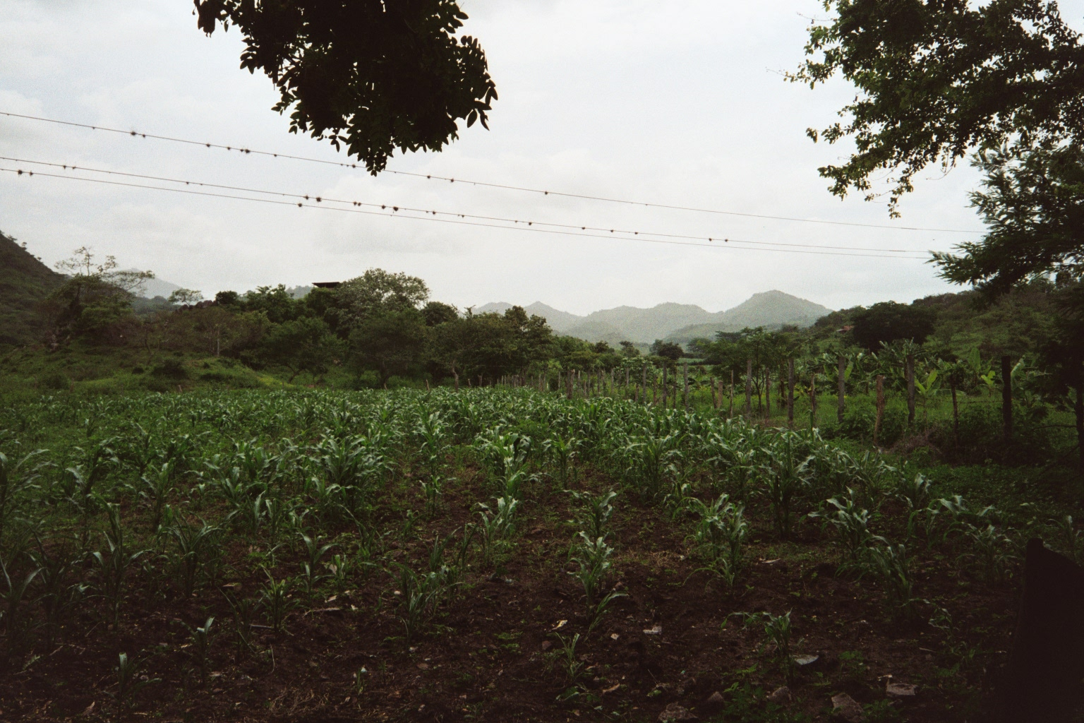 Campo, cerca Pueblo Nuevo, Nicaragua 2002